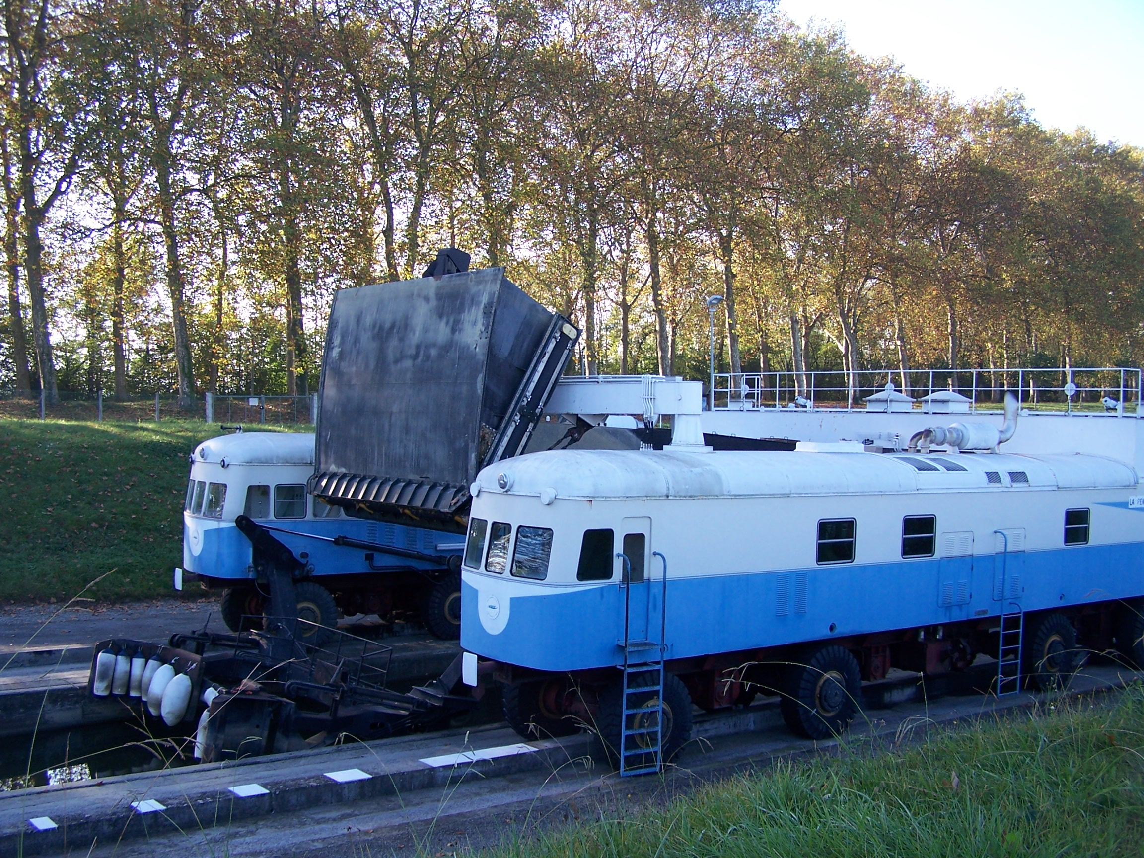 Pente d'eau de Montech. Bouclier-moteur masque relevé